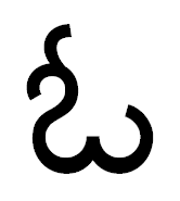 дирга свара о